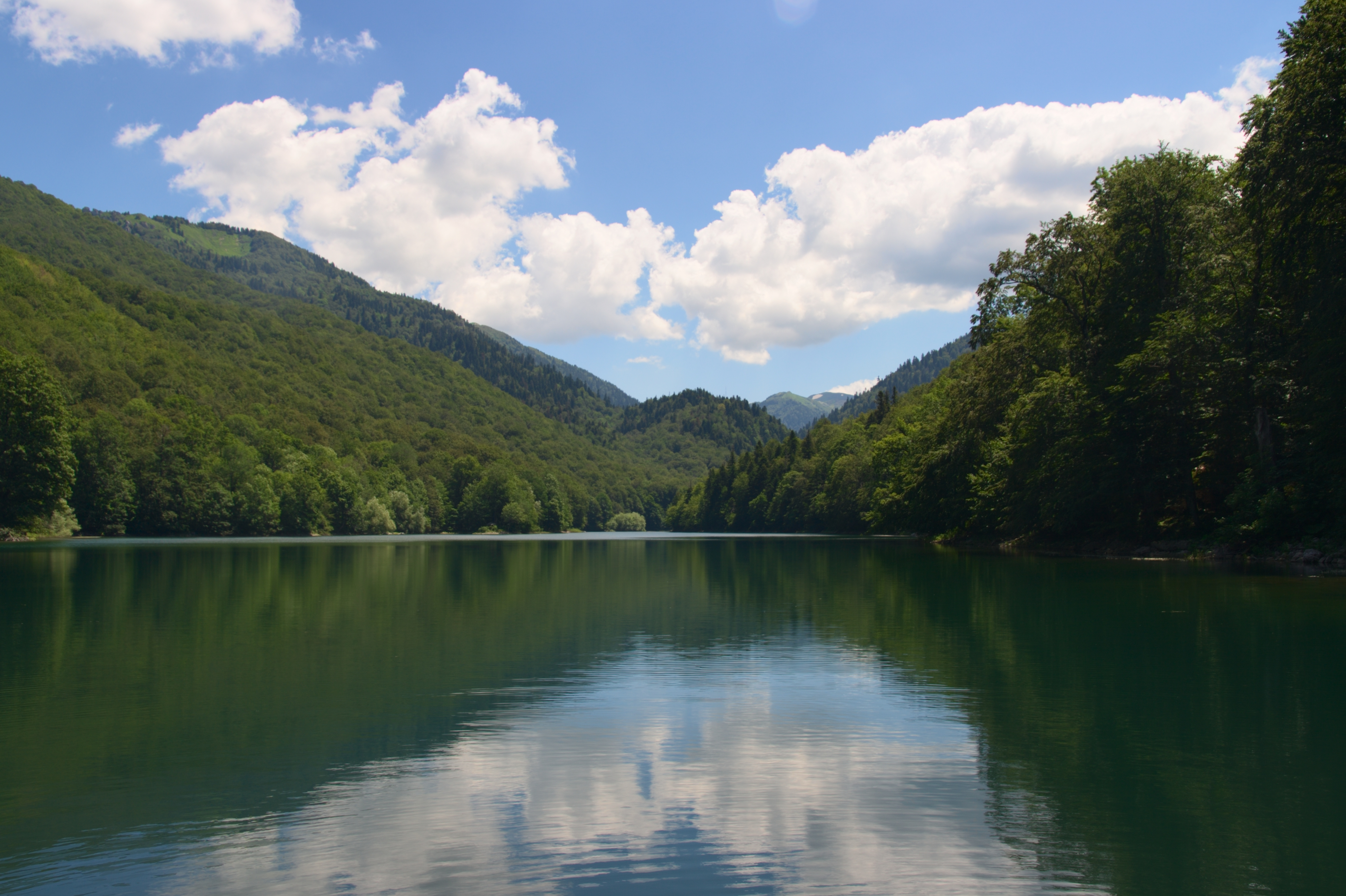 Biogradsko jezero en el Parque nacional Biogradska Gora.